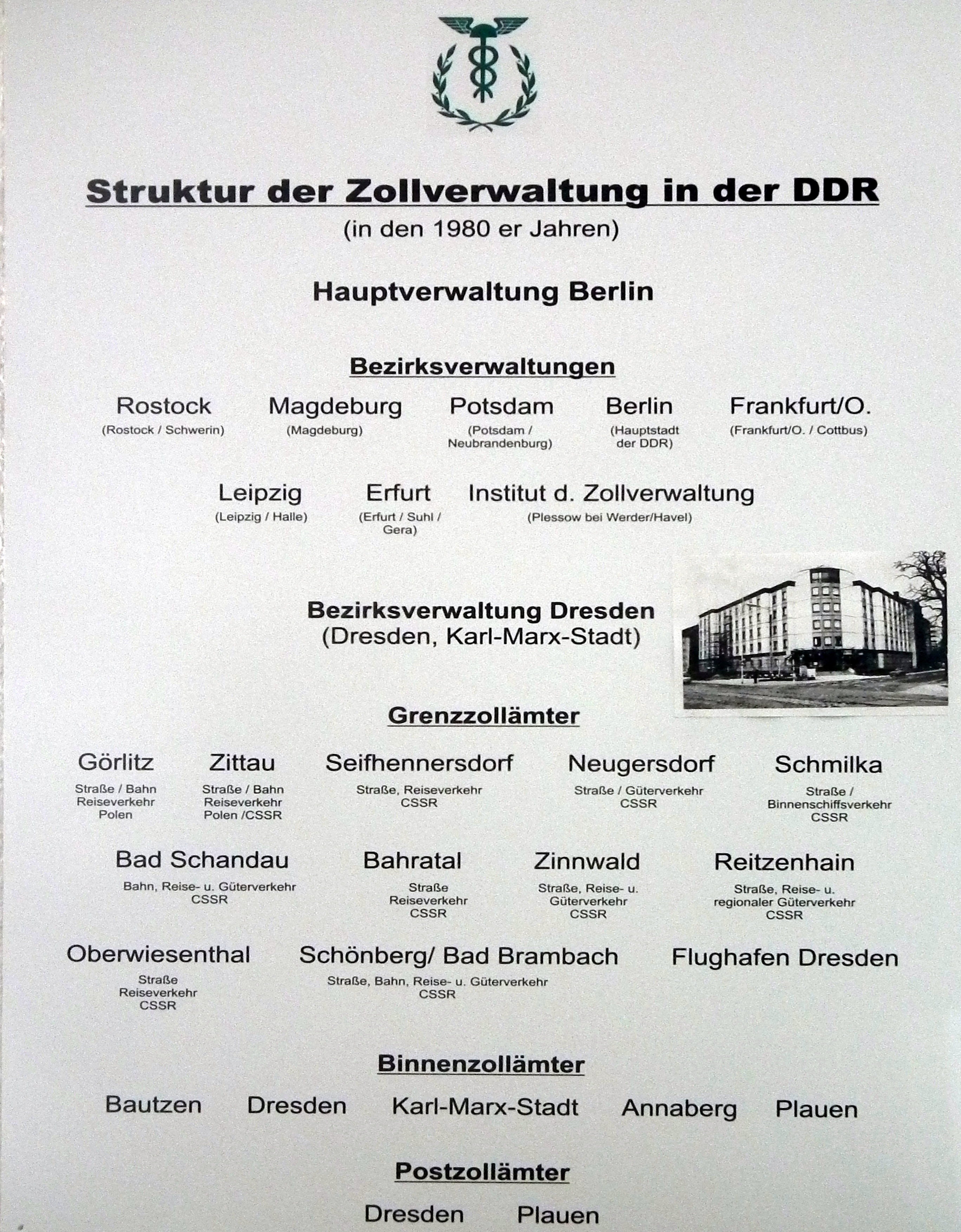 Struktur der Zollverwaltung in der DDR, DDR-Museum Pirna, Veröffentlicht mit Genehmigung der Museumsleitung